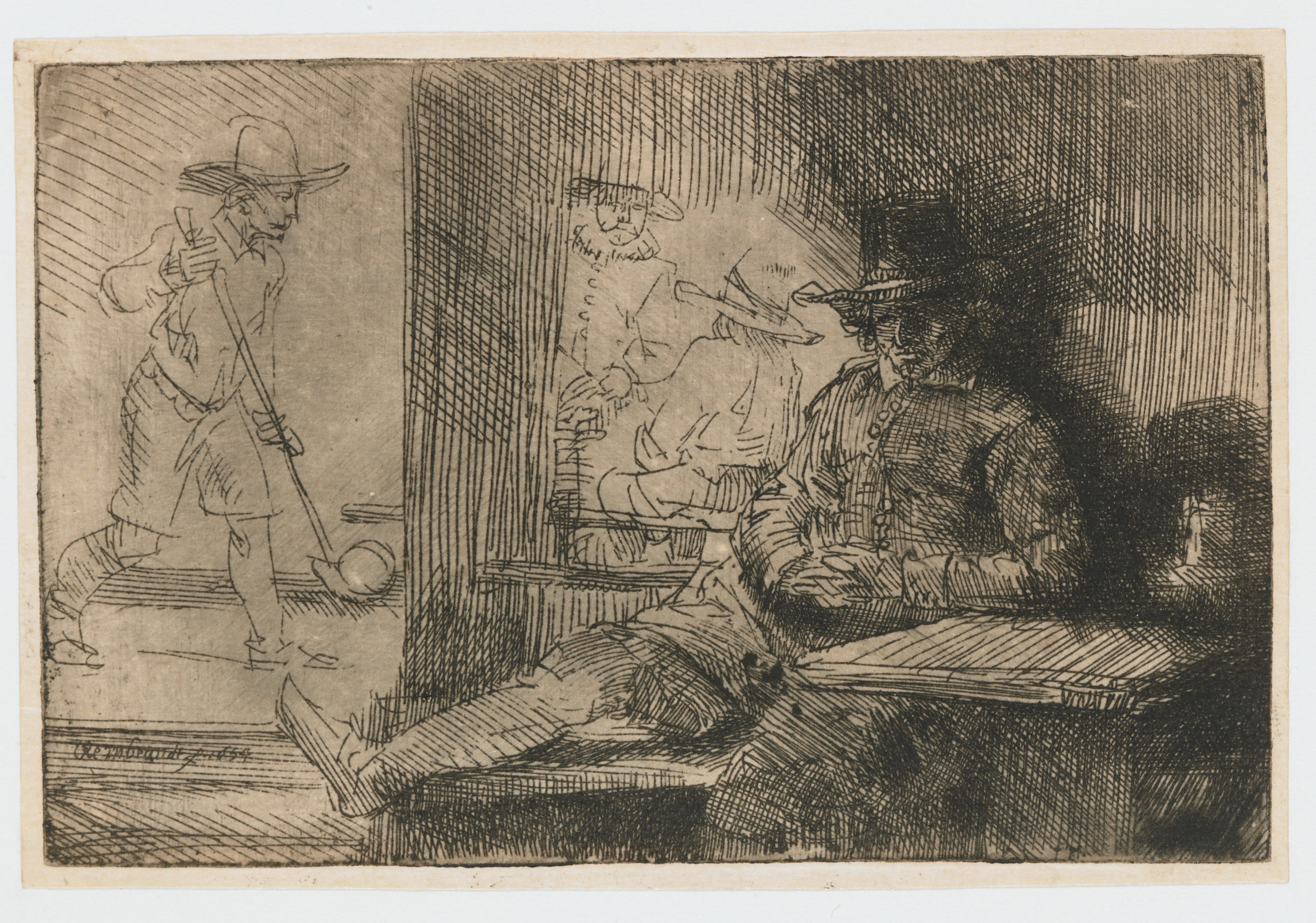 Ets van een beugelaar, zichtbaar vanuit de binnenkant van een herberg